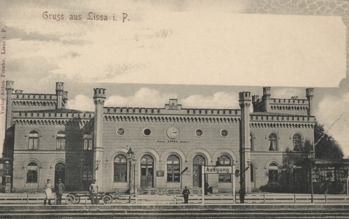 Zachodnia strona dworca kolejowego w Lesznie przed rozbudową w 1905 r.. Peron, z którego od 30 października 1857 r., odchodziły pociągi w kierunku Głogowa. (oryginał w Archiwum Państwowym w Lesznie)